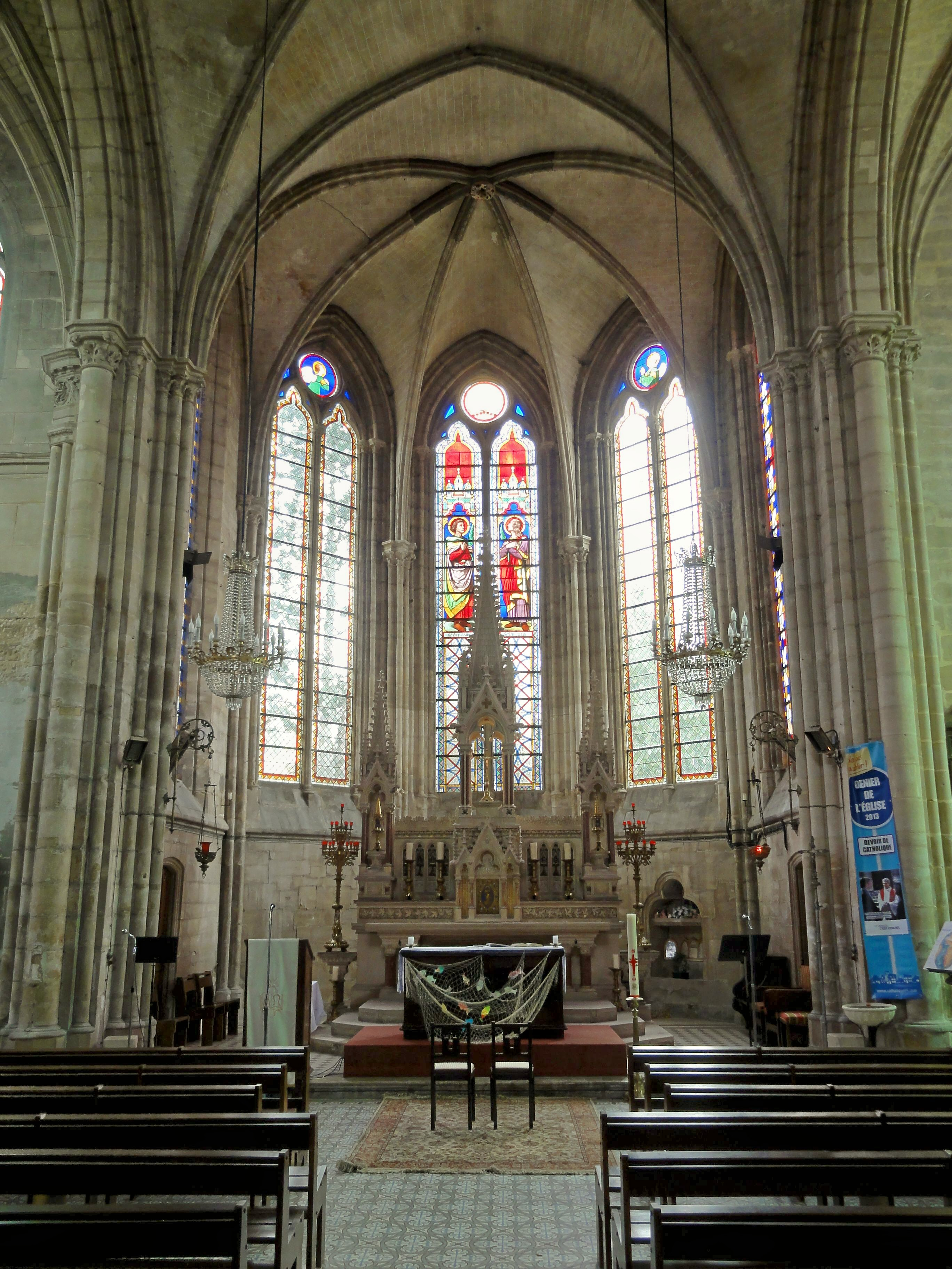 Abside.